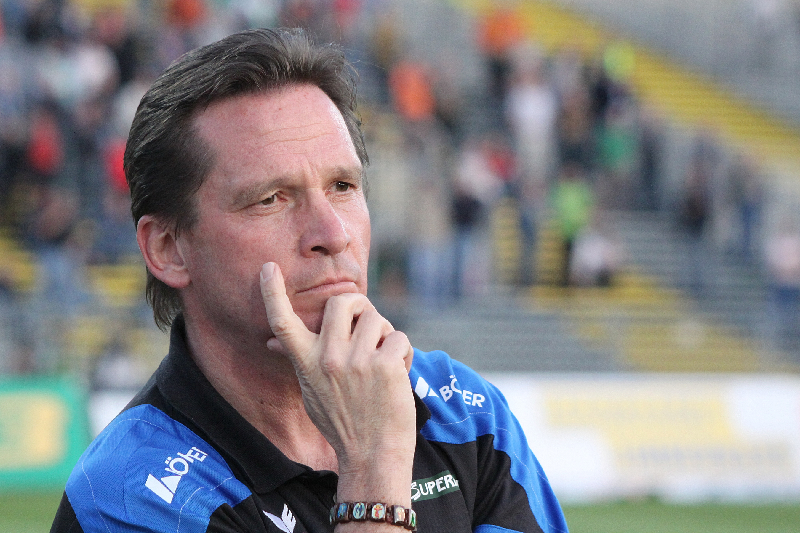 Werner Gregoritsch, Trainer – Kapfenberger SV (Bild 2)